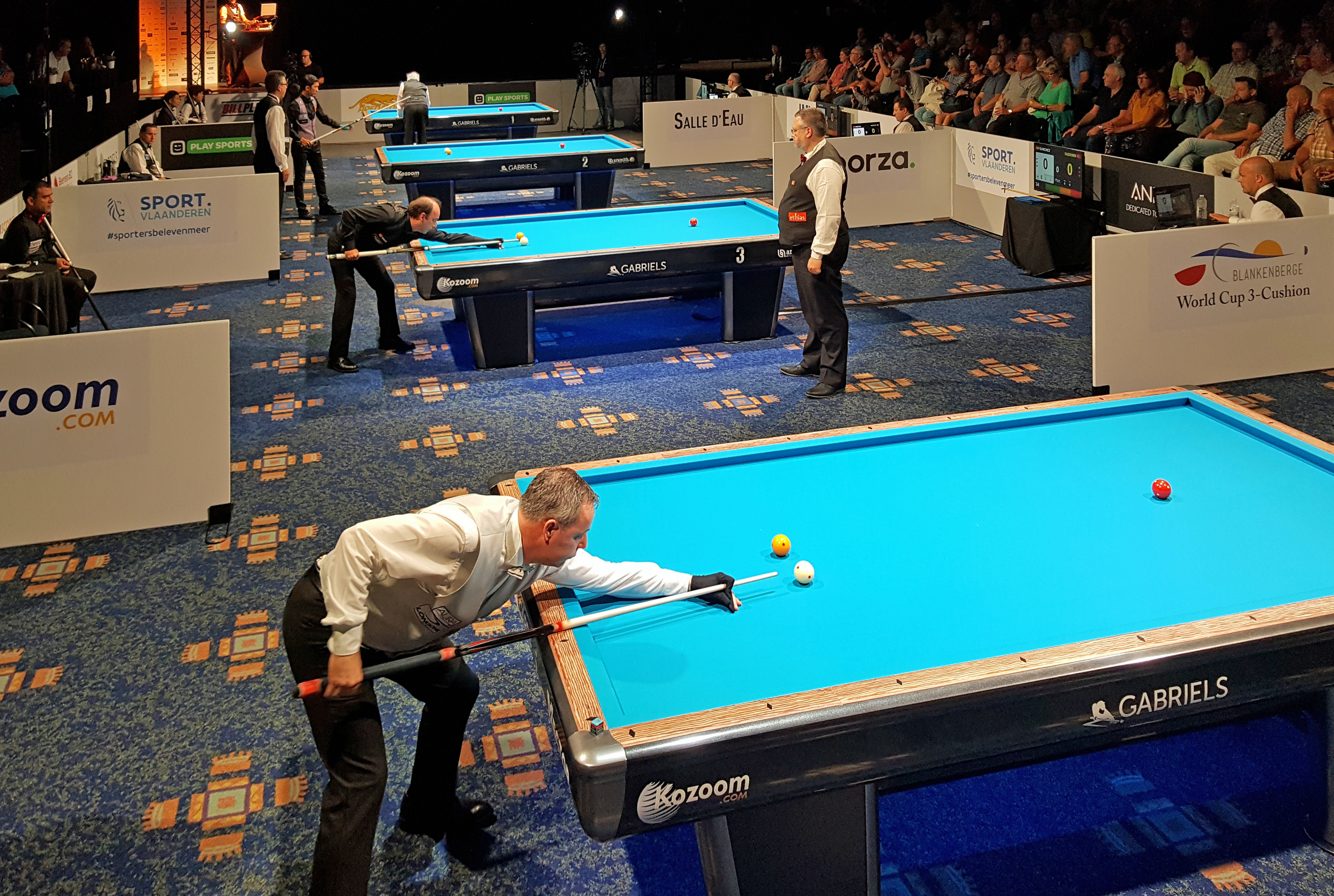 Carambolage Dreiband-Weltcup 2018/3.